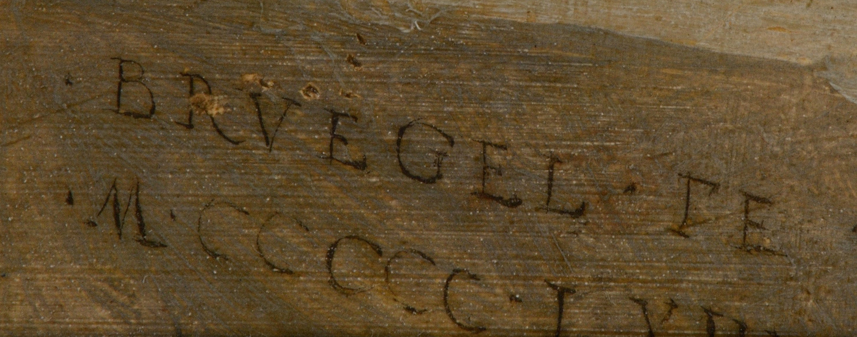 Signatur des Wiener Turmbaus zu Babel